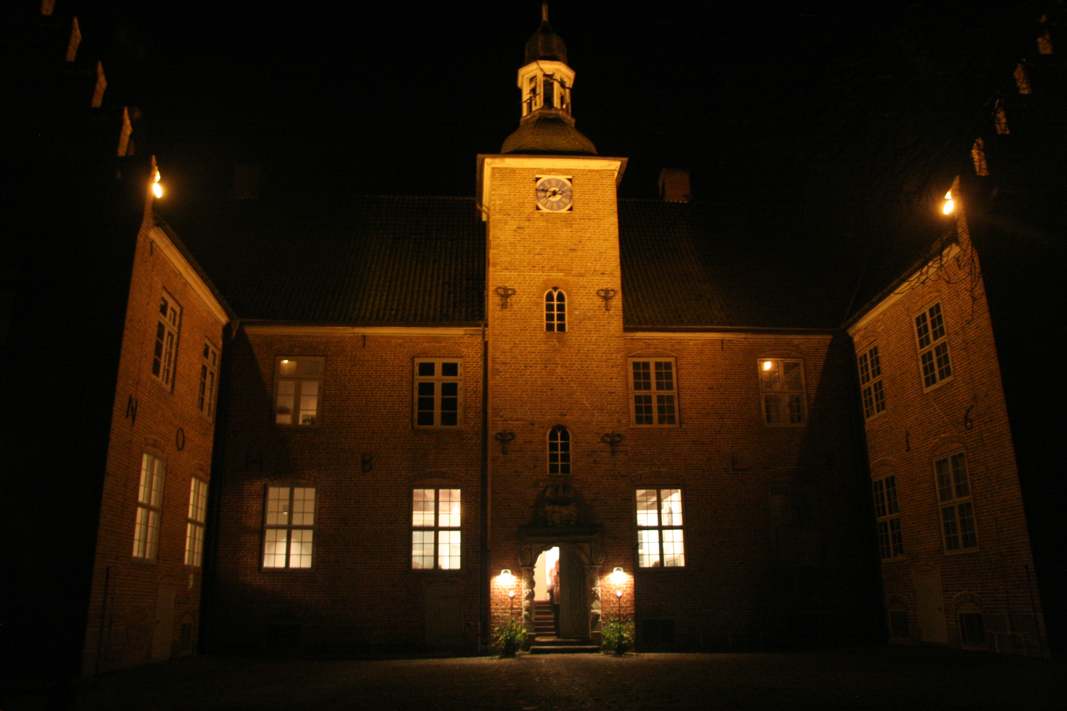 Herrenhaus Hagen at night